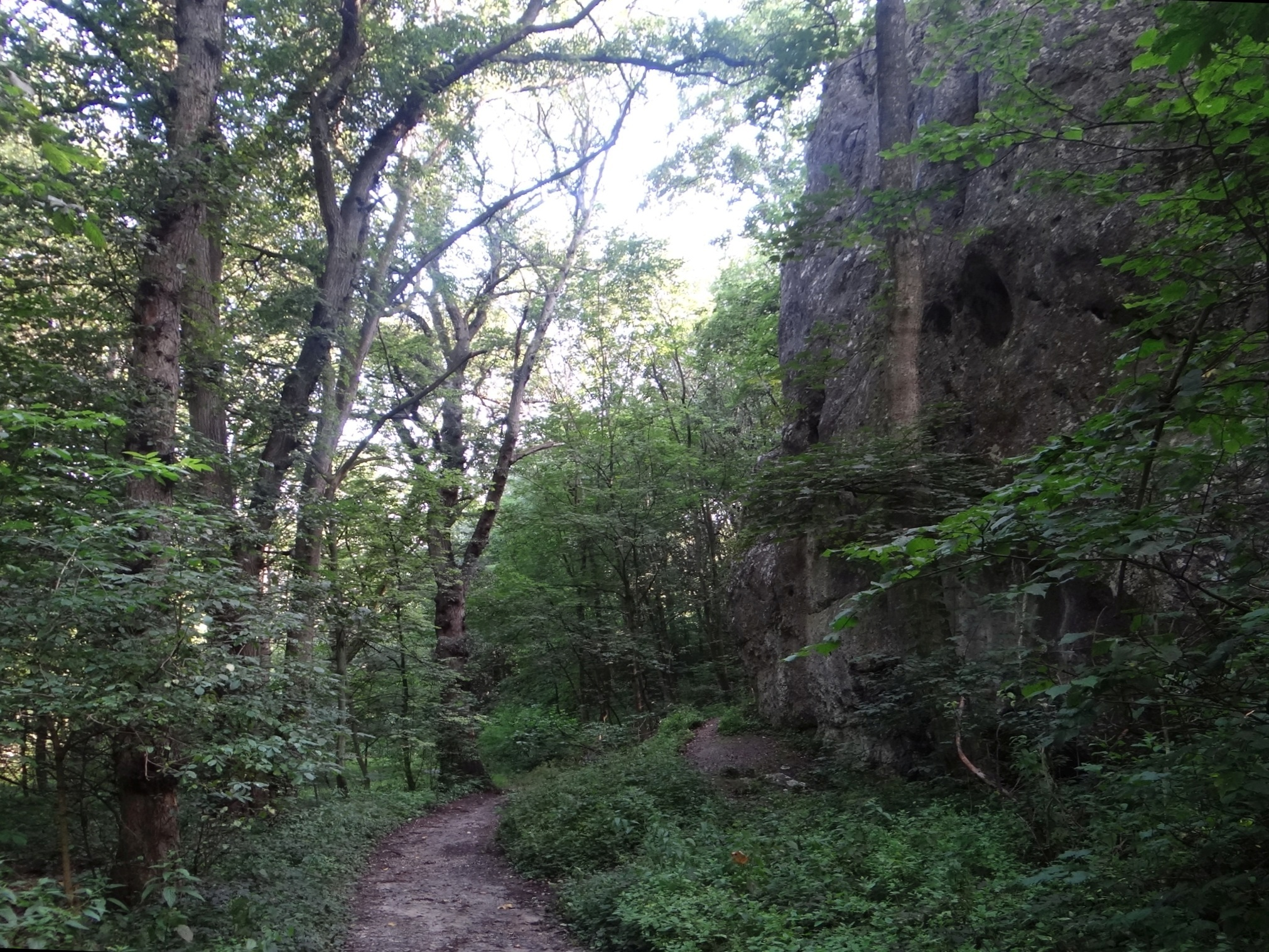 Wielka Skała w Wąwozie Podskalańskim